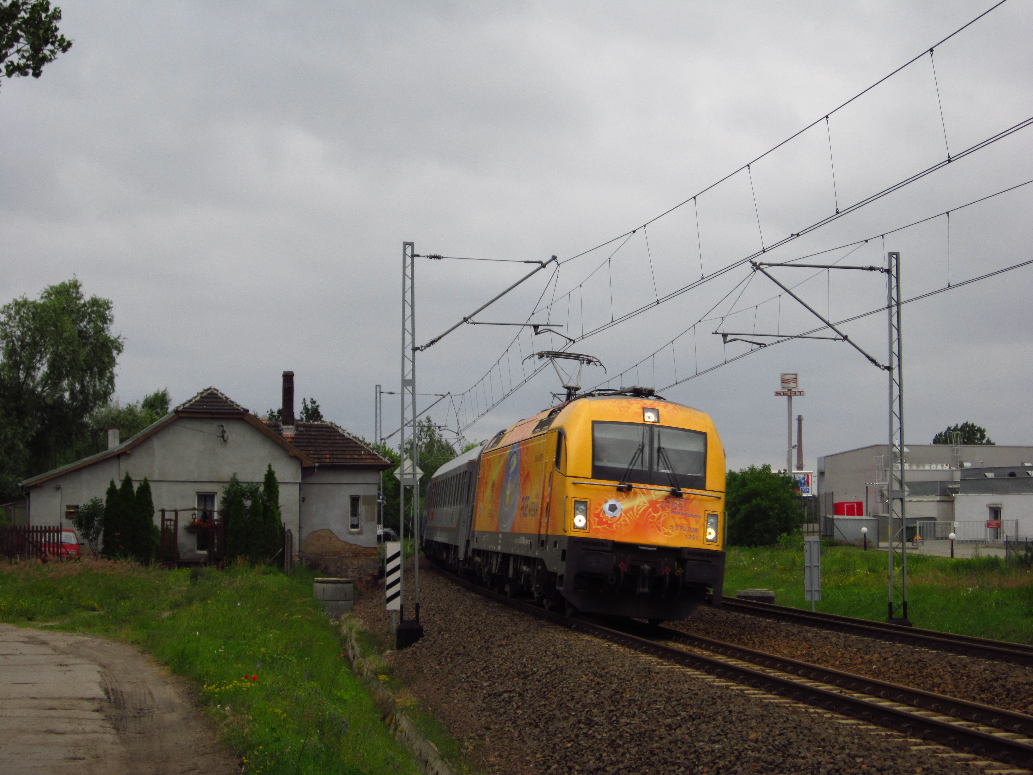 Lokomotywa EU44 oklejona w barwy PGE Areny Gdańsk na czas trwania EURO 2012.